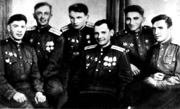 Офицеры 117 гвардейского стрелкового полка: В.А. Огурцов, А.П. Передерий, С.Р. Мартыненко, Н.Е. Фросенко, Д.В. Скрипник, П.П. Черных. 1944 год